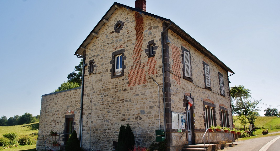 La Mairie